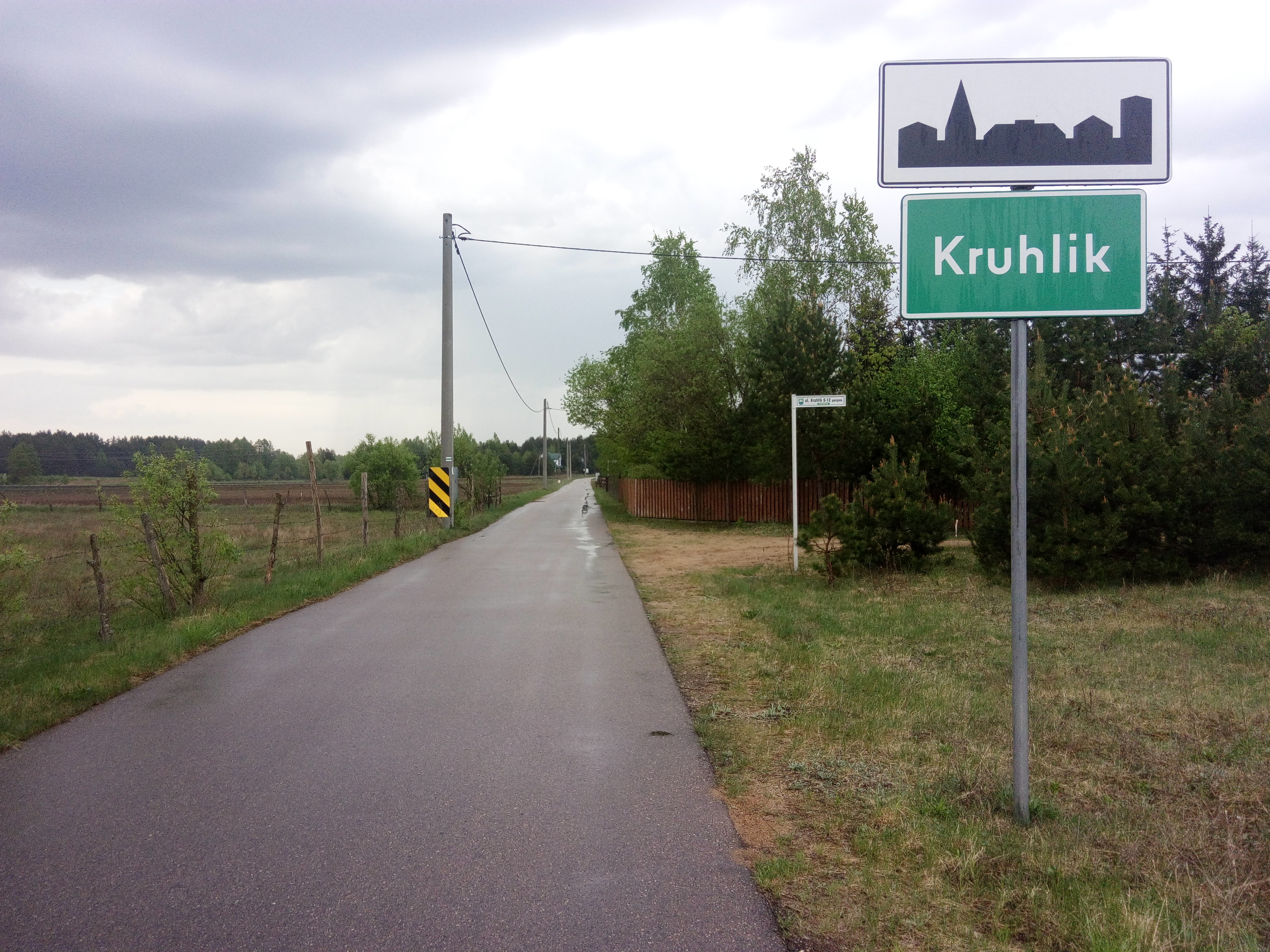 Wjazd do Kruhlika (część Tarnopola, gmina Narewka)